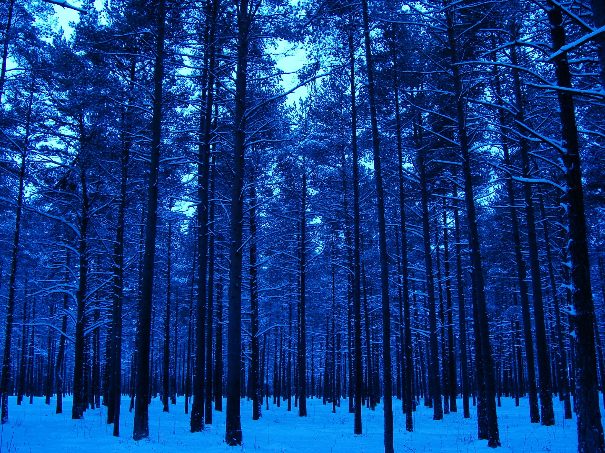 Pines in winter, Männiku, Estonia